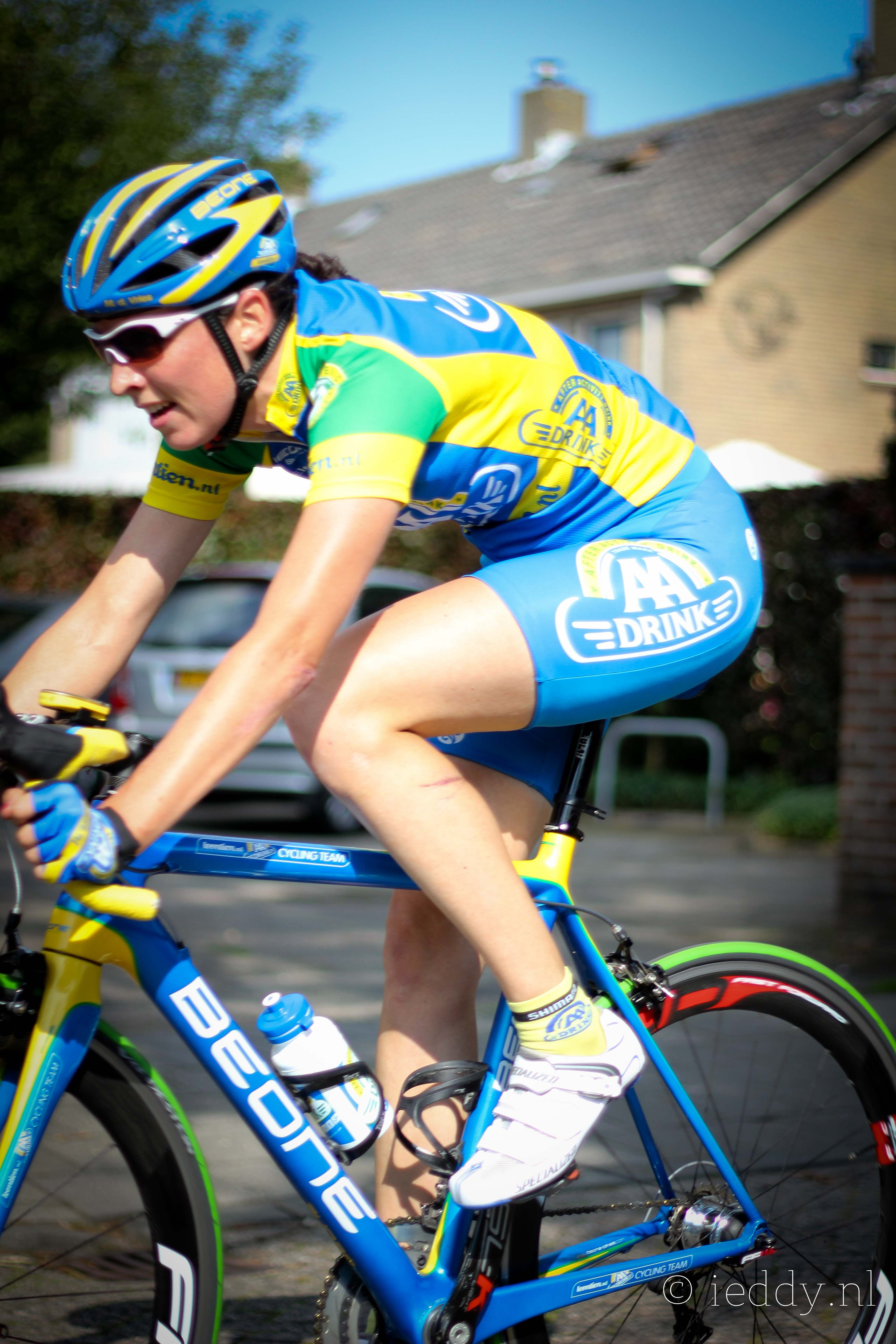 AA Cycling team Draai van de Kaai 2011